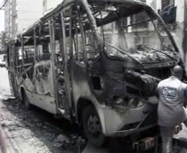 Operação de ocupação pela polícia da Vila Cruzeiro, na Penha, na zona norte do Rio, que era considerada uma fortaleza do tráfico. Reprodução de imagens da TV Brasil (ABr)